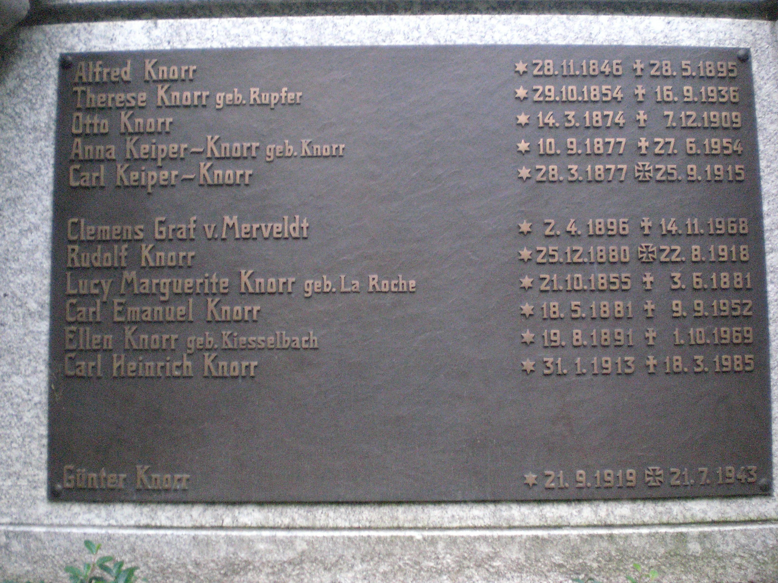 Das Bild zeigt die Tafel, die auf dem Grab der Familie Knorr, rechts angebracht ist. Das Grab befindet sich auf dem Hauptfriedhof Heilbronn.